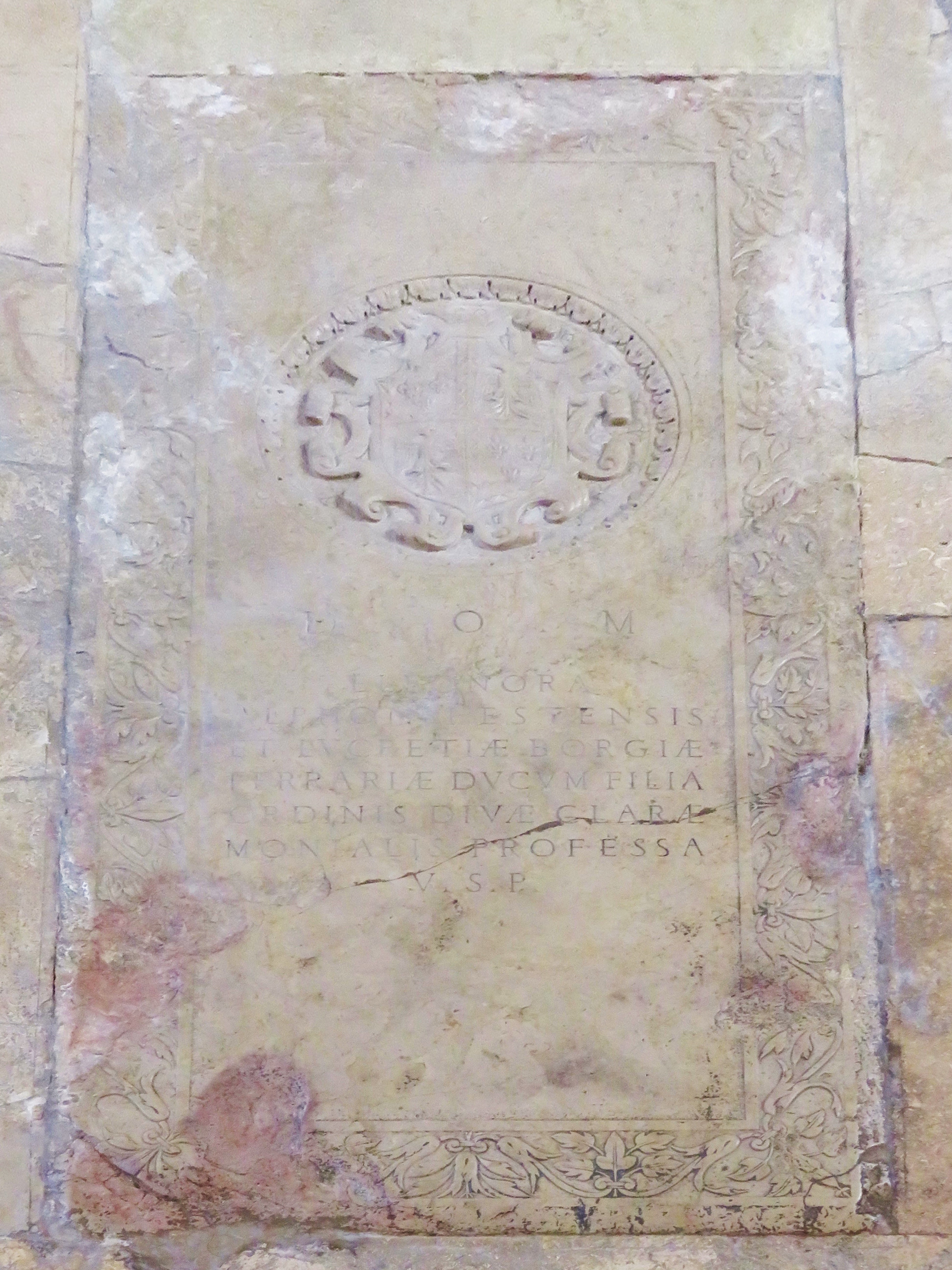 Tombe casata degli Estensi - Eleonora d'Este